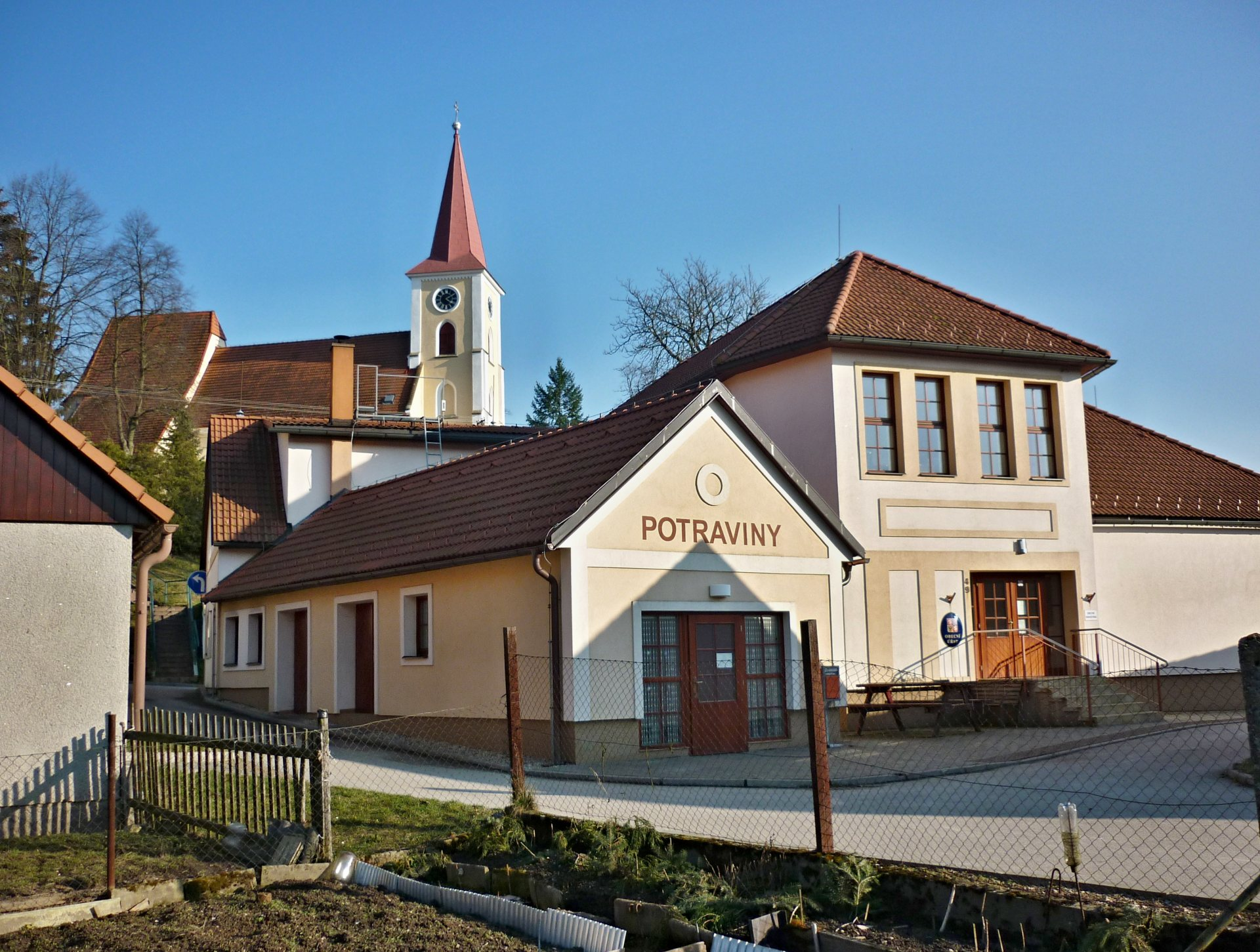 Kostelní Radouň - obecní úřad